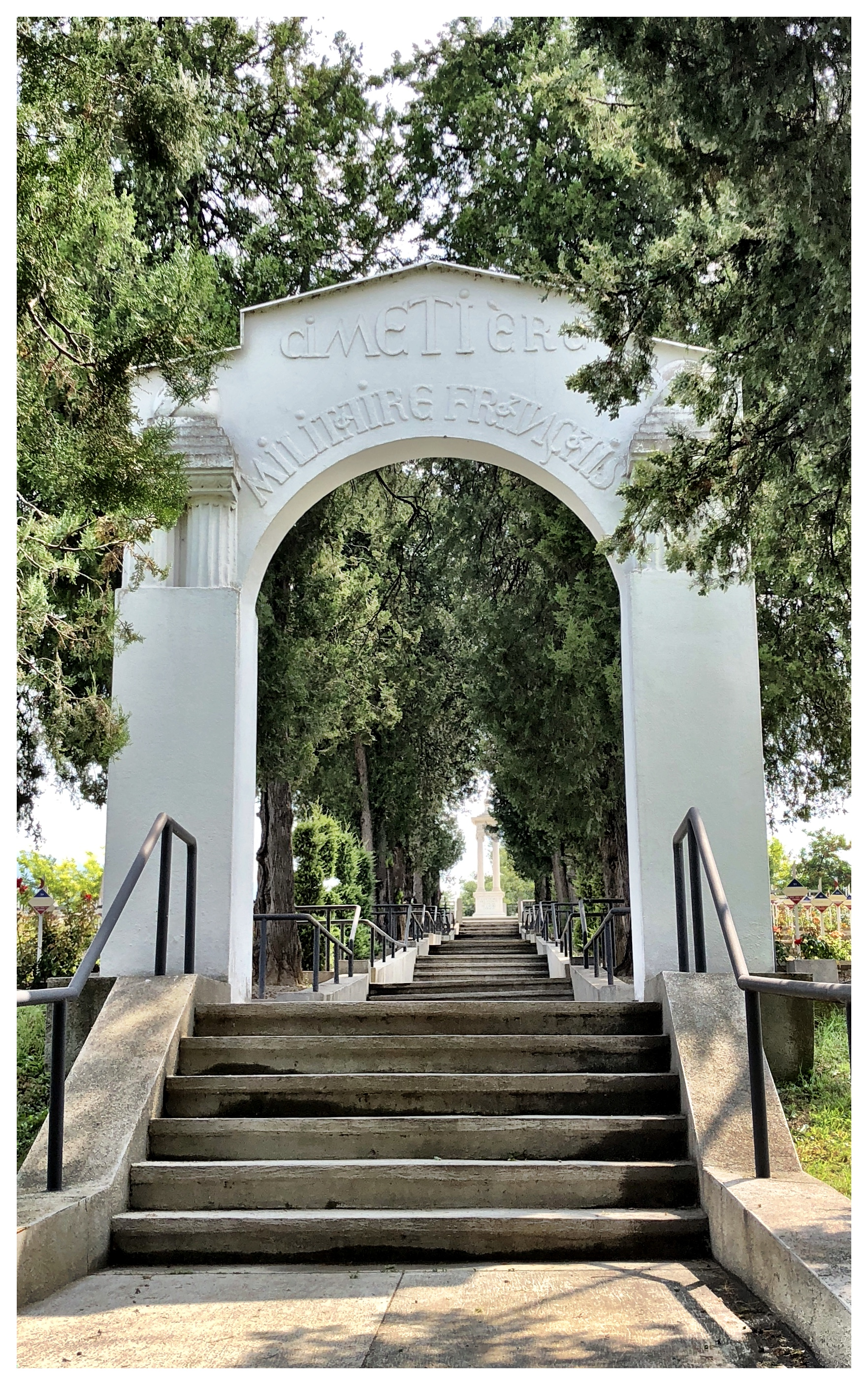 WWI French military cemetery, Skopje, Macedonia Skopje, Macedonia